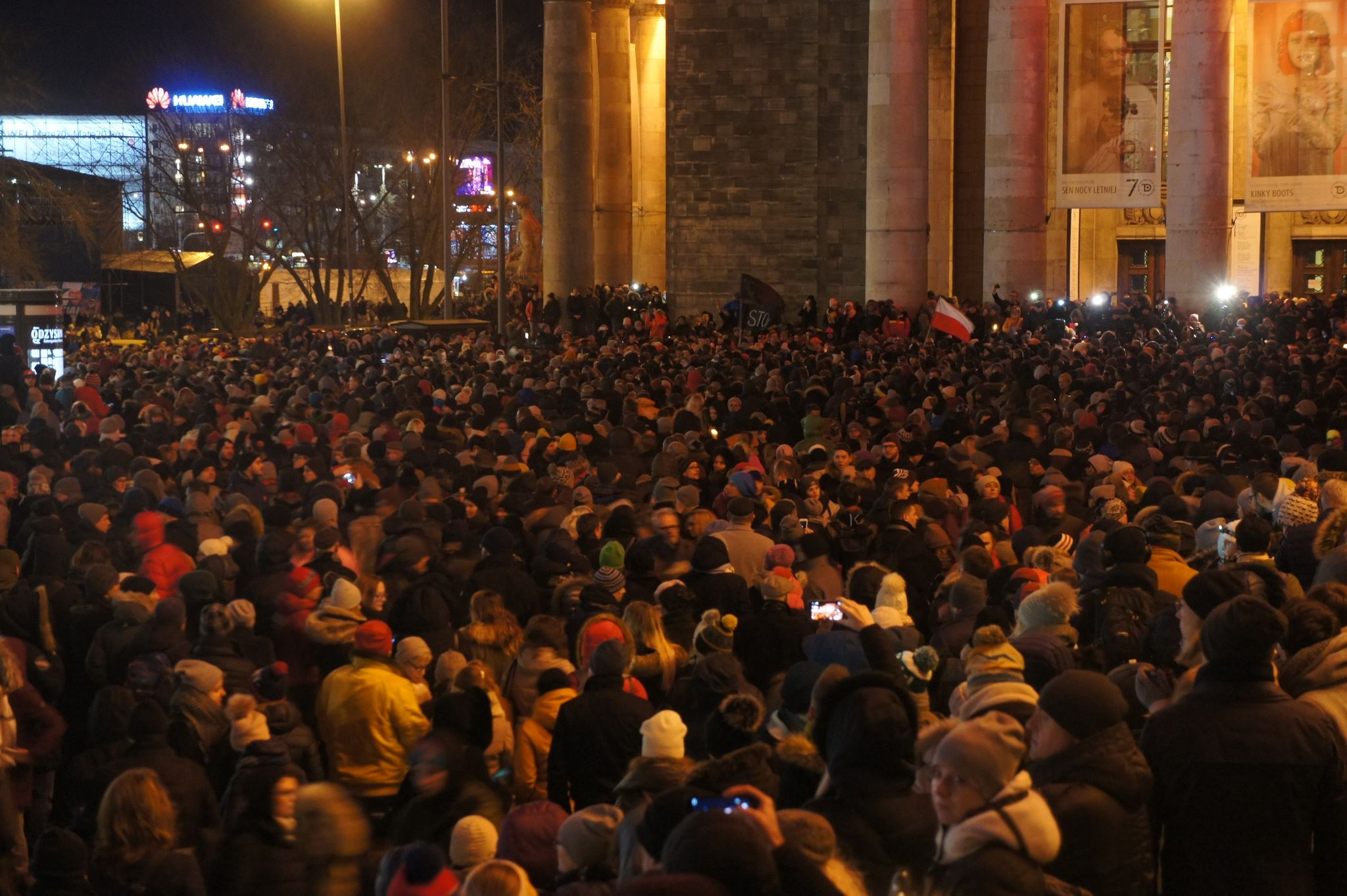 Marsz przeciwko przemocy w Warszawie zorganizowany na pl. Defilad w dniu 14 stycznia 2019 po śmierci prezydenta Gdańska Pawła Adamowicza.